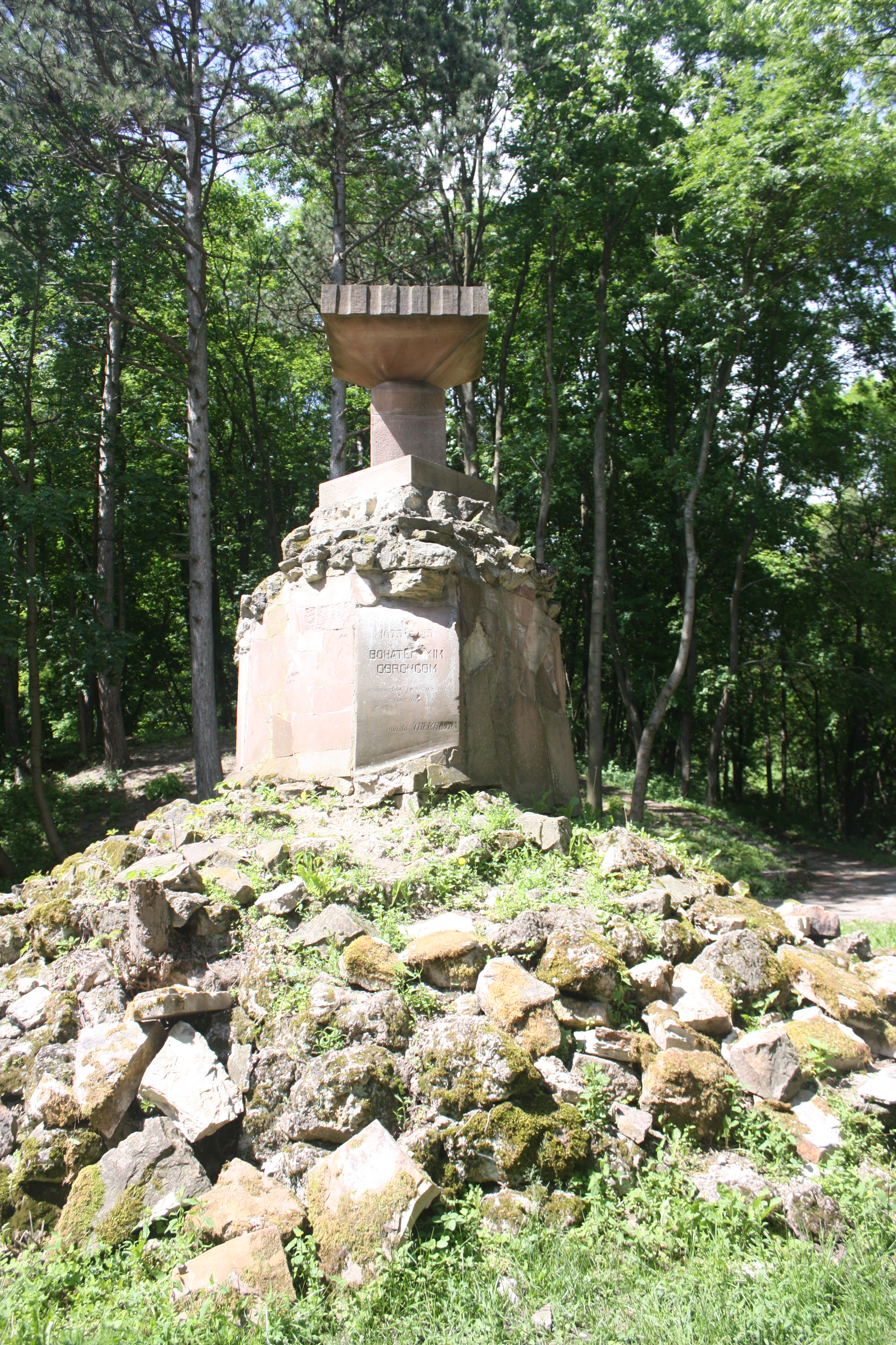 Trembowla (Теребовля), pomnik Zofii Chrzanowskiej, stan 2010